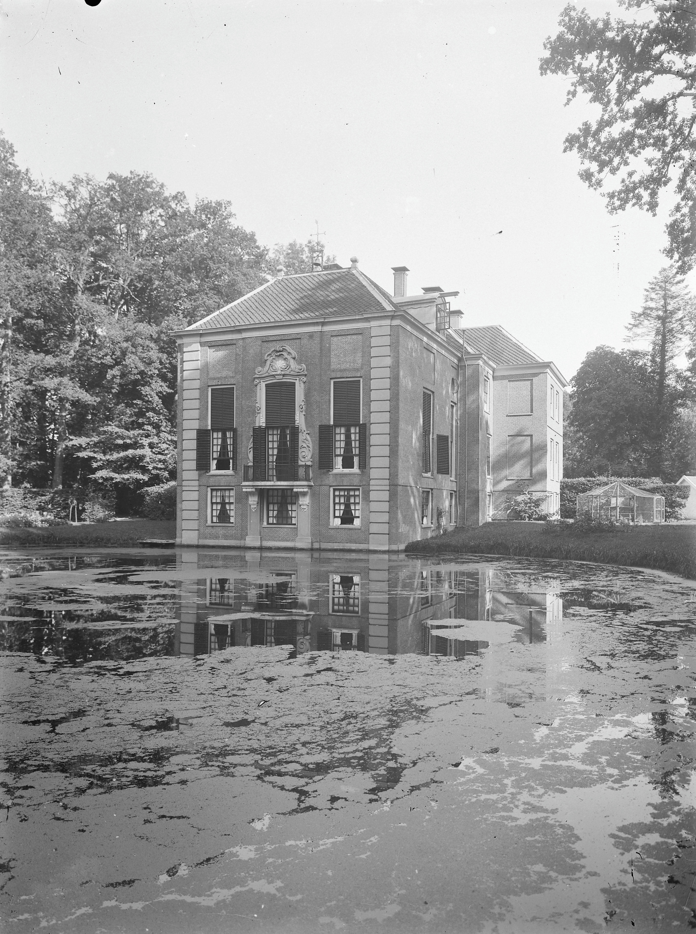 Huis Over-Holland: Overzicht gevel straatzijde met balkon en vijver (opmerking: In: Buiten ; 17(1923), nr. 24, p. 282)